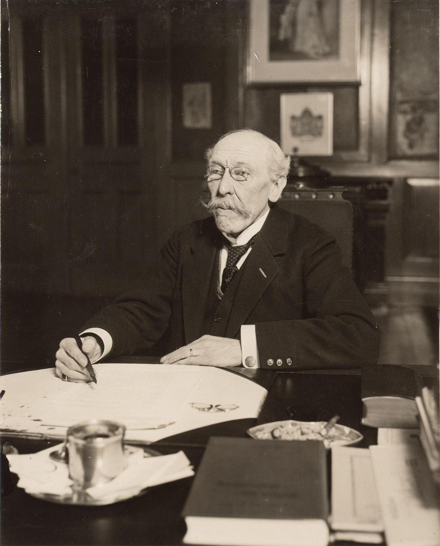 Arend Anne baron van der Feltz (1862-1940); Procureur-generaal in Amsterdam 1918-1927 / Attorney-General 1918-1927